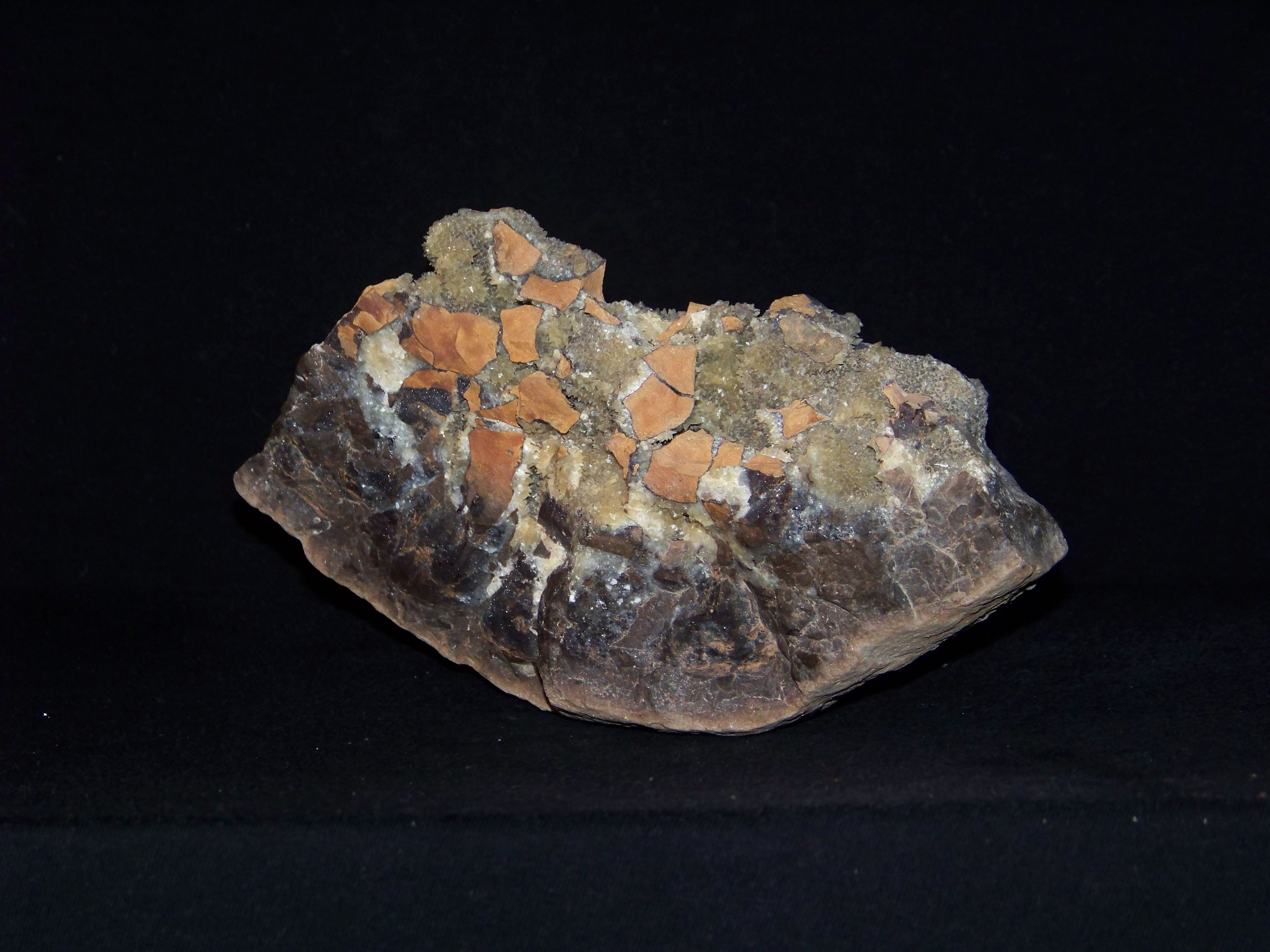 Sferosyderyt z kalcytem ipirytem, Jura krakowsko-Częstochowska